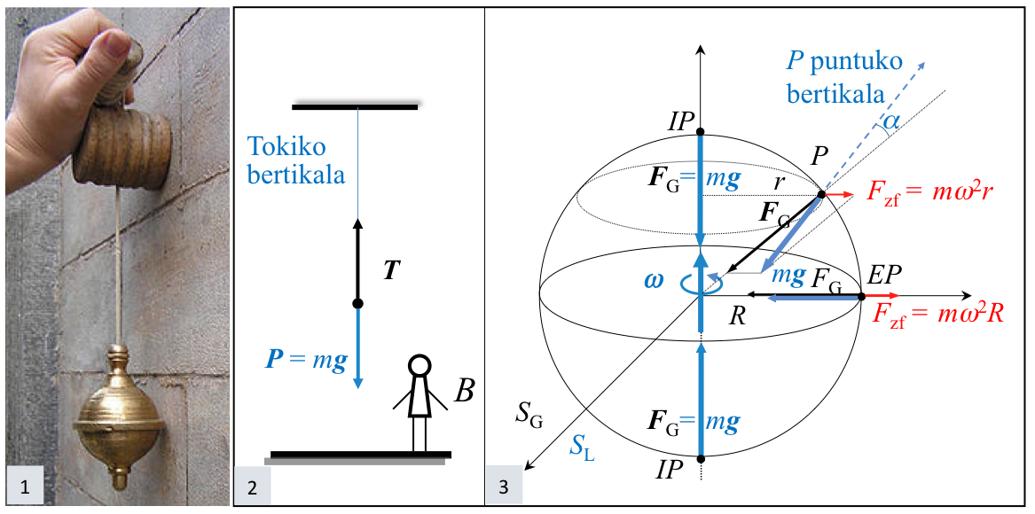 Pisu eraginkorra osatzen duten indarren eskema Lurreko puntu desberdinetan.